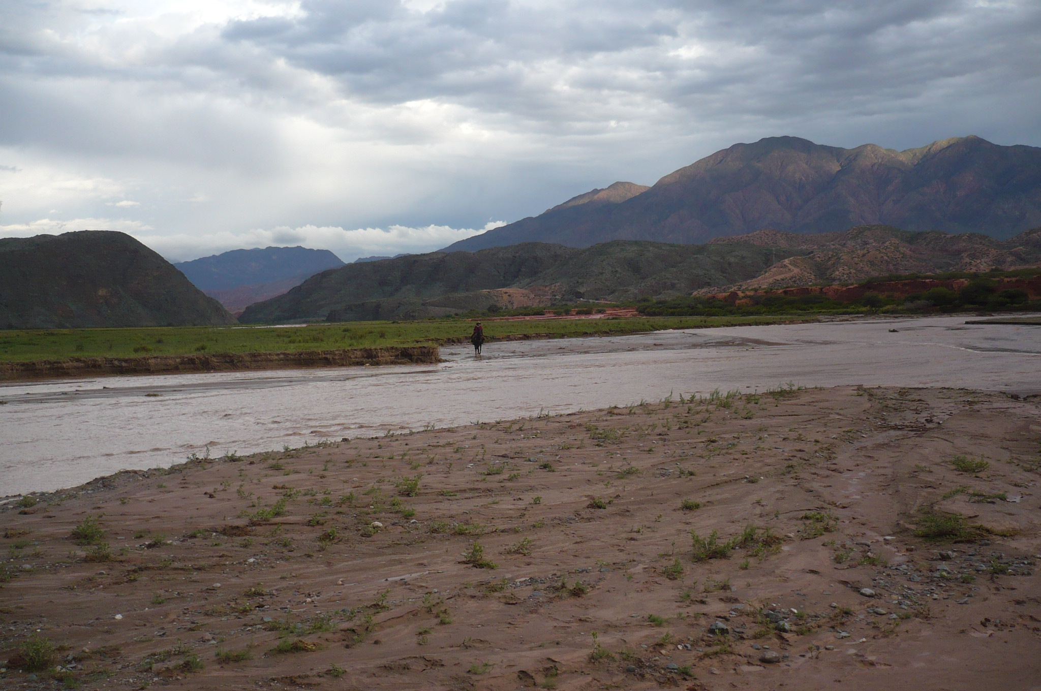 Zona de Las Juntas o la Cíenaga y confluesncia de los ríos Calchaquí y Santa María, Cafayate, Salta, Argentina.